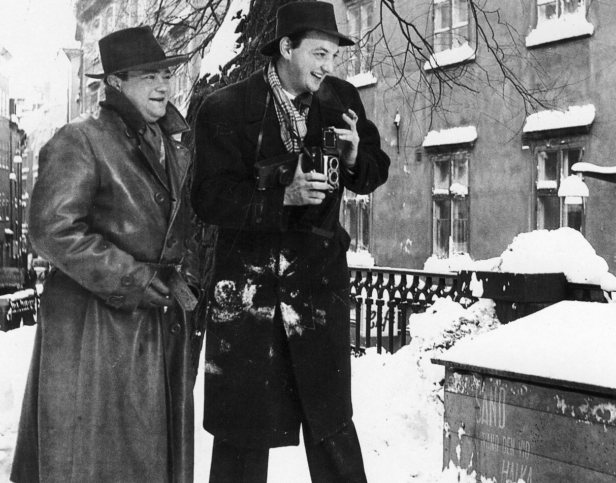 Författaren Stig Trenter (vänster) med sin romanfigur Harry Friberg (Fotografen K W Gullers)